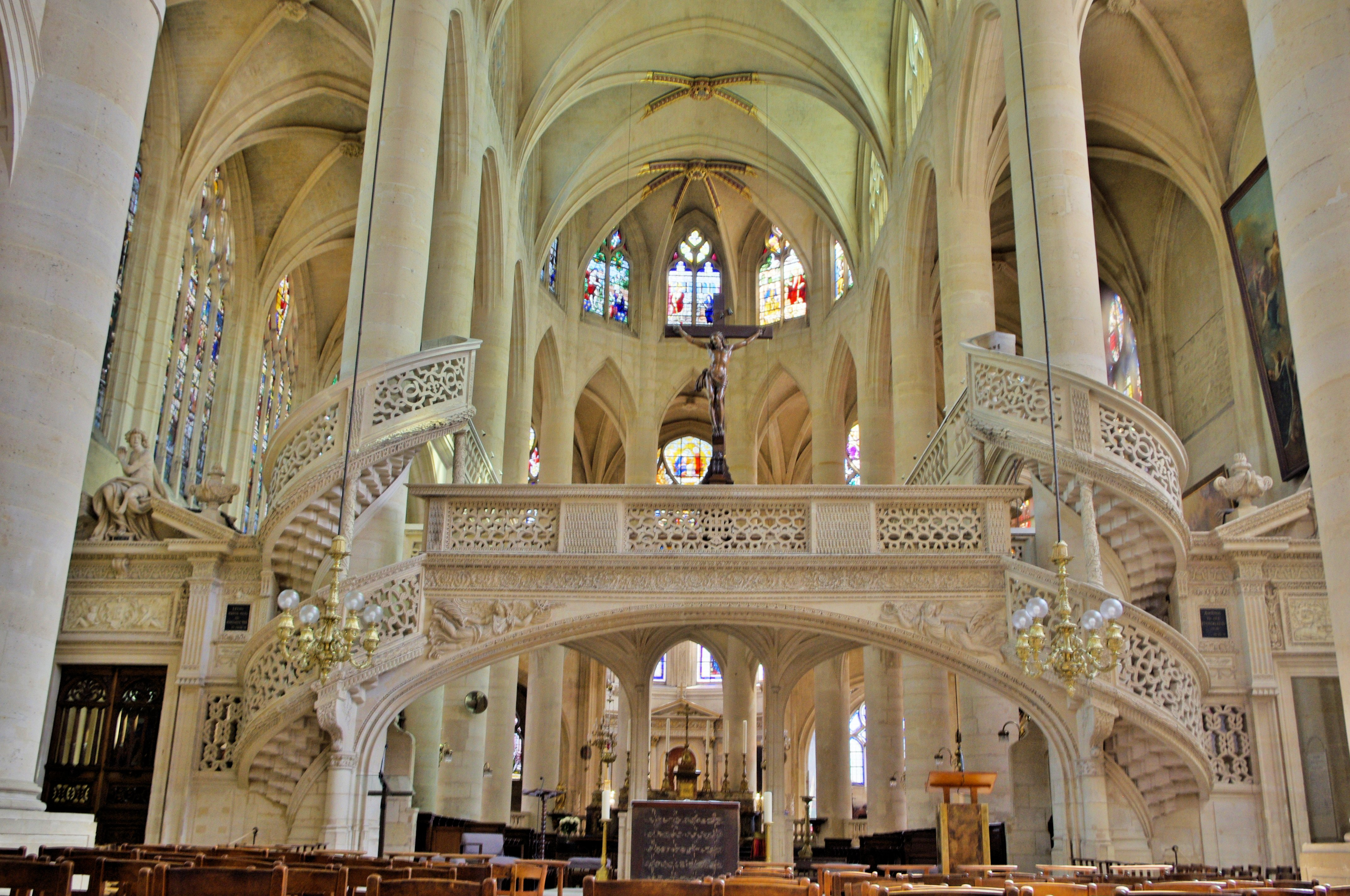 Église Saint-Étienne-du-Mont, Paris.